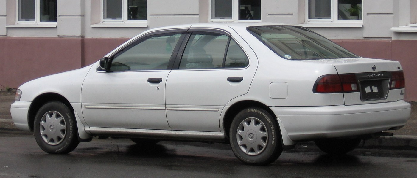 Photo taken in Tomsk, Russia